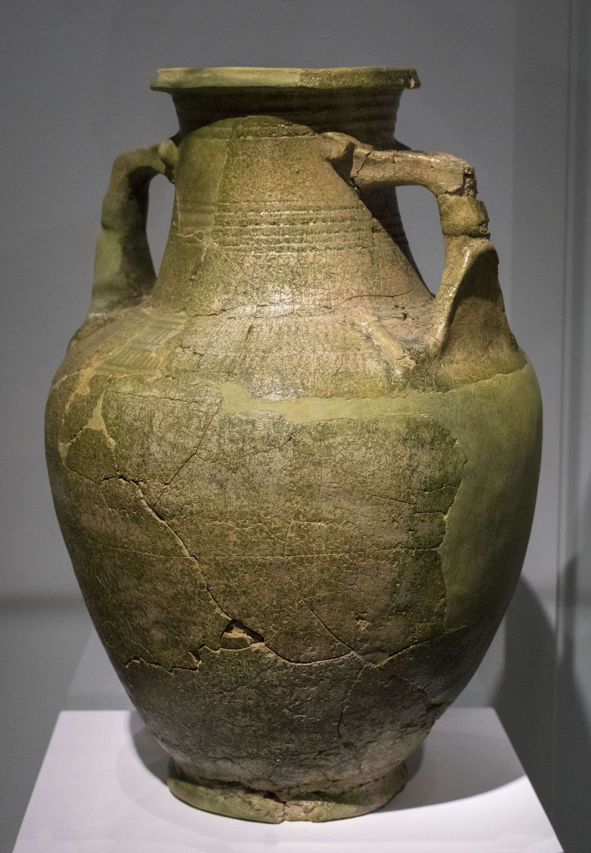 Mleiha es un gran lugar arqueológico en el Emirato de Sharjah con restos que van desde el tercer milenio a.C. hasta el siglo III d.C. Este cántaro de arcilla vidriada procede de este lugar y se ha datado en el siglo II a.C. Lo fotografié en una exposición temporal en el MAN "El hallazgo moderno del país de Magán".